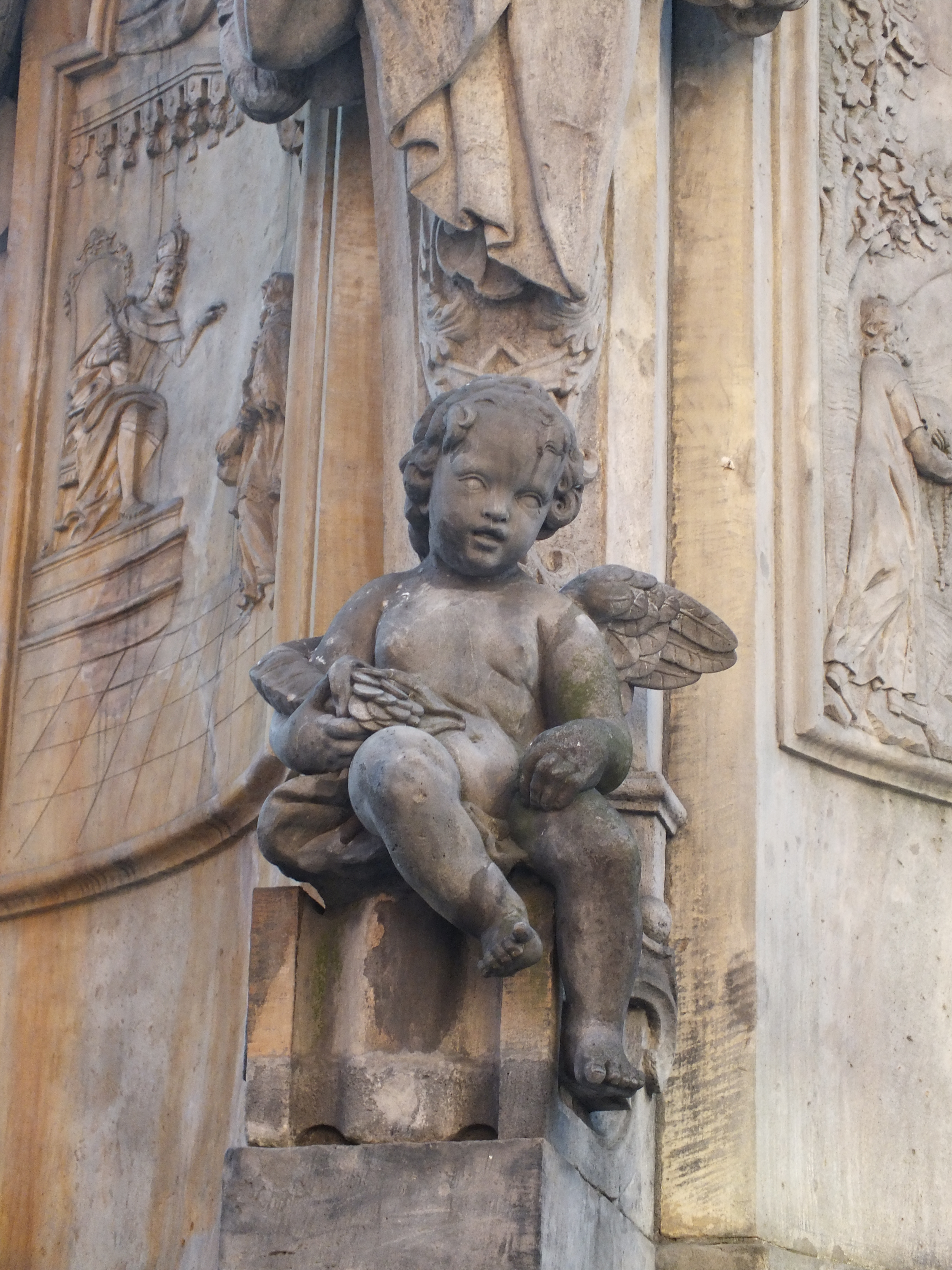 Wrocław, Ostrów Tumski, aniołek na cokole pomnika św. Jana Nepomucena